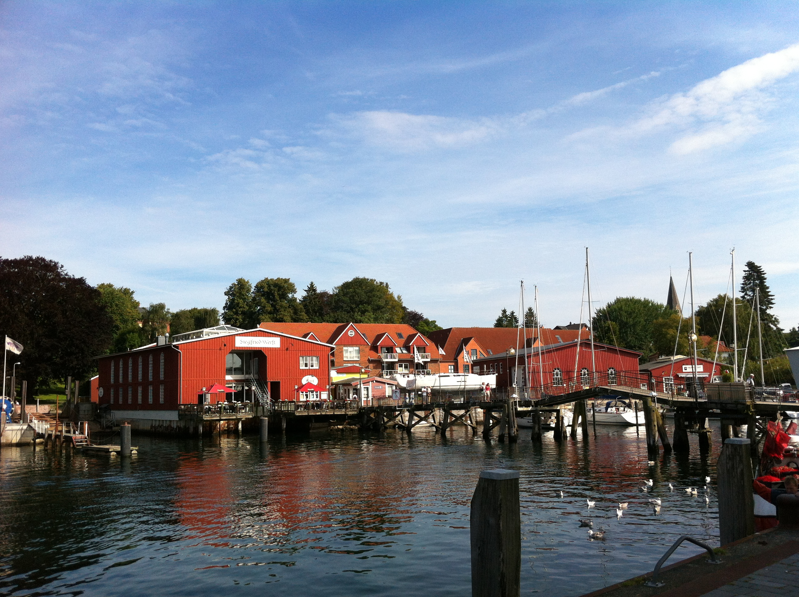 Siegfriedwerft Eckernförde (2012)